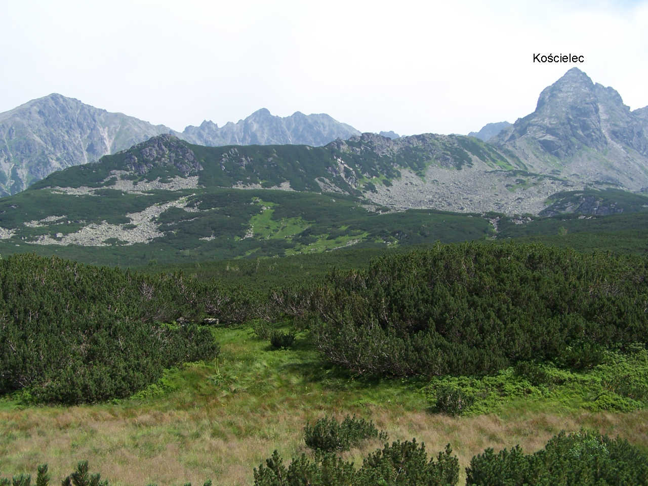 Dolina Gąsienicowa (Tatra Mountains)